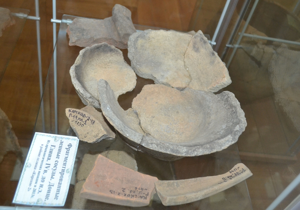 Керамика с раскопок на хуторе Карском